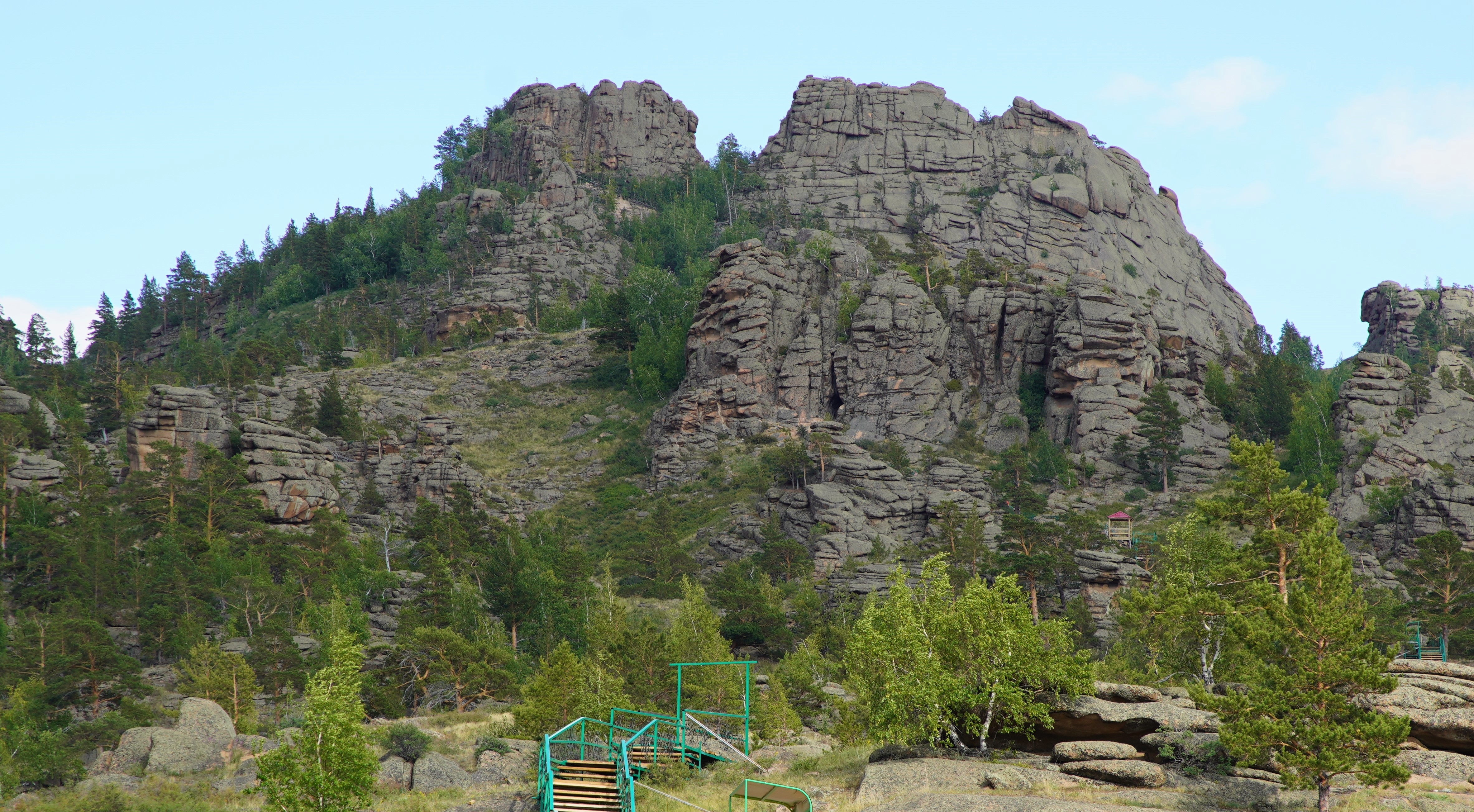 Пещера Коныр-Аулие, Баянаульский национальный парк